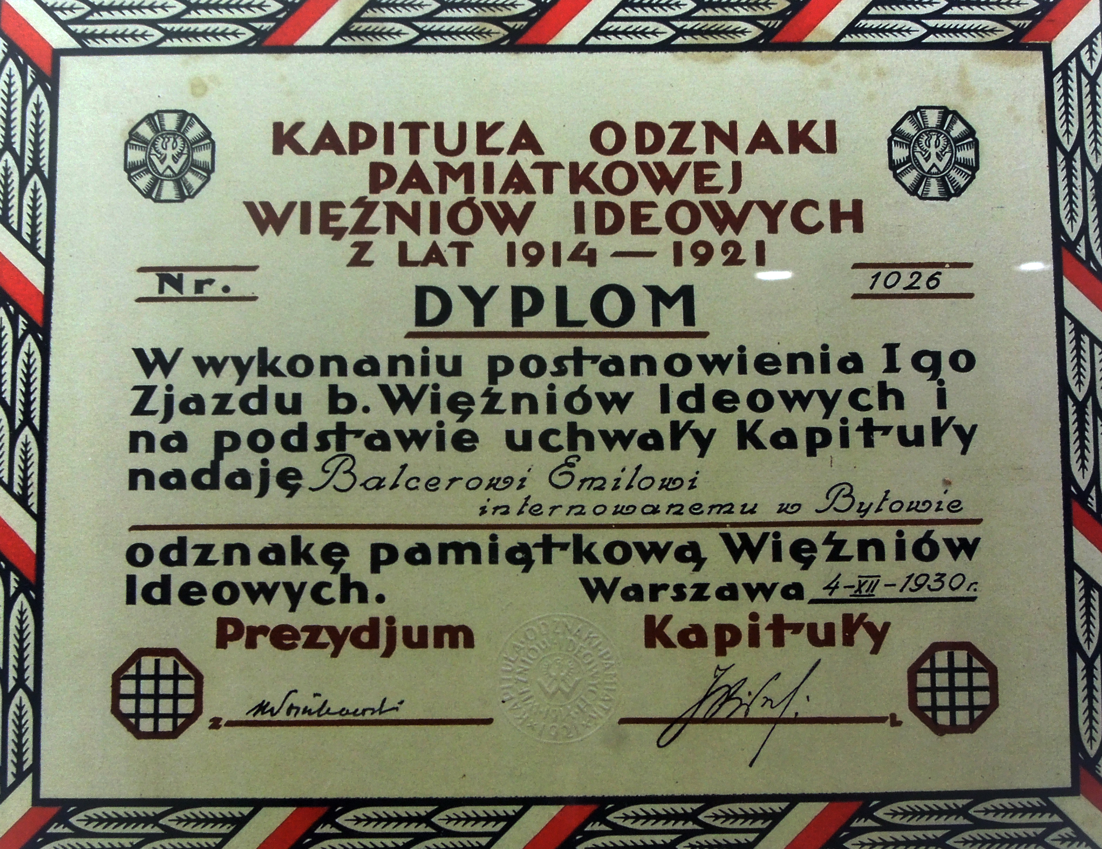 Kapituła Odznaki Więźniów Ideowych; dyplom z podpisem Józefa Piłsudskiego przyznany wraz z odznaką Emilowi Balcerowi internowanemu w Bytowie